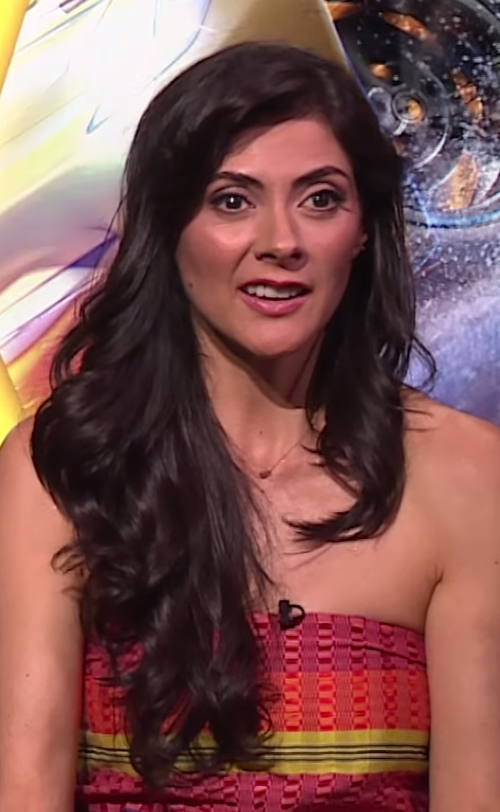 Kuno Becker y Verónica Jaspeado hablan sobre "Cars 3"